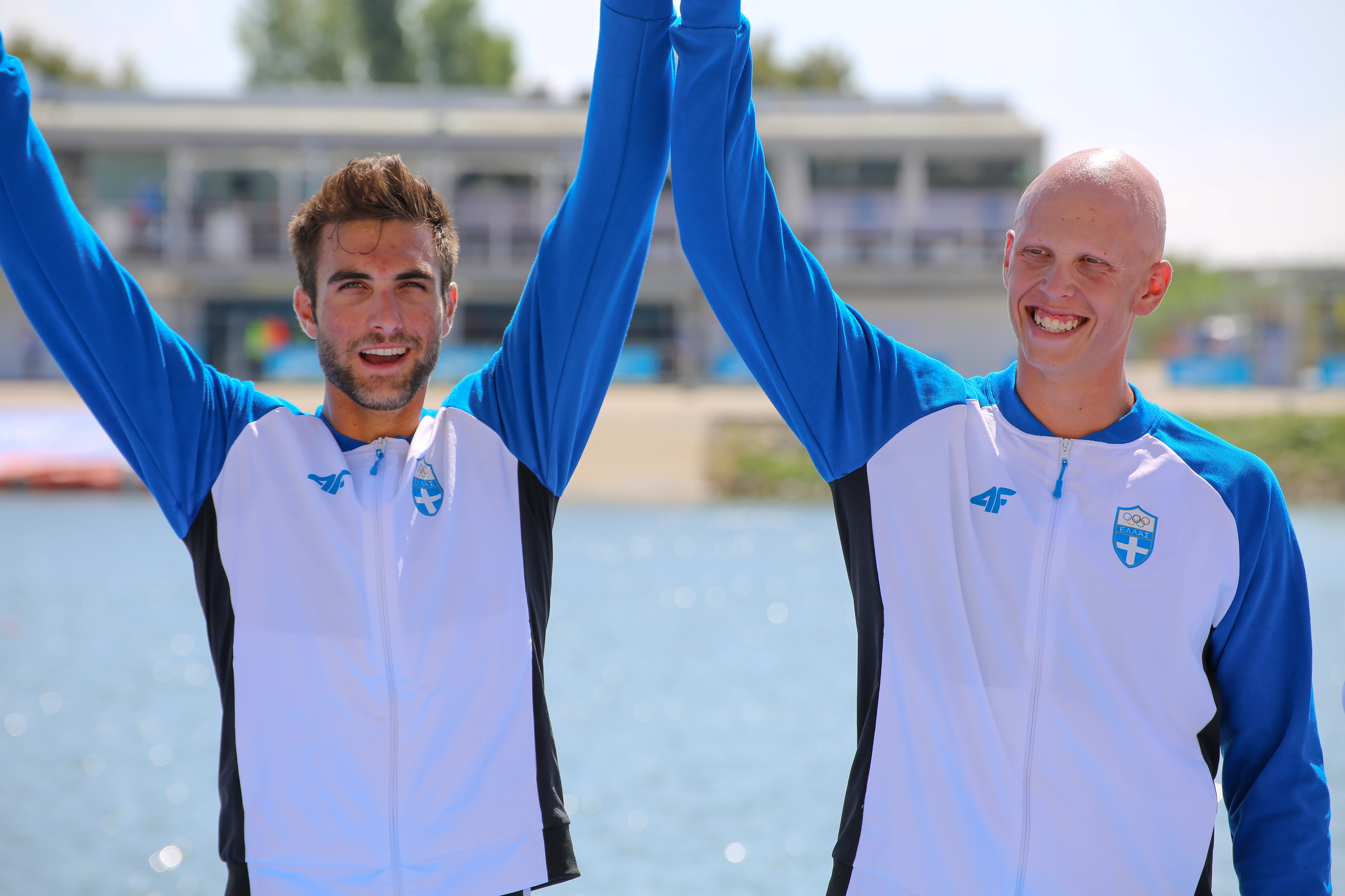 Stefanos Ntouskos y Christos Stergiakas, oro en los Juegos del Mediterráneo 2018